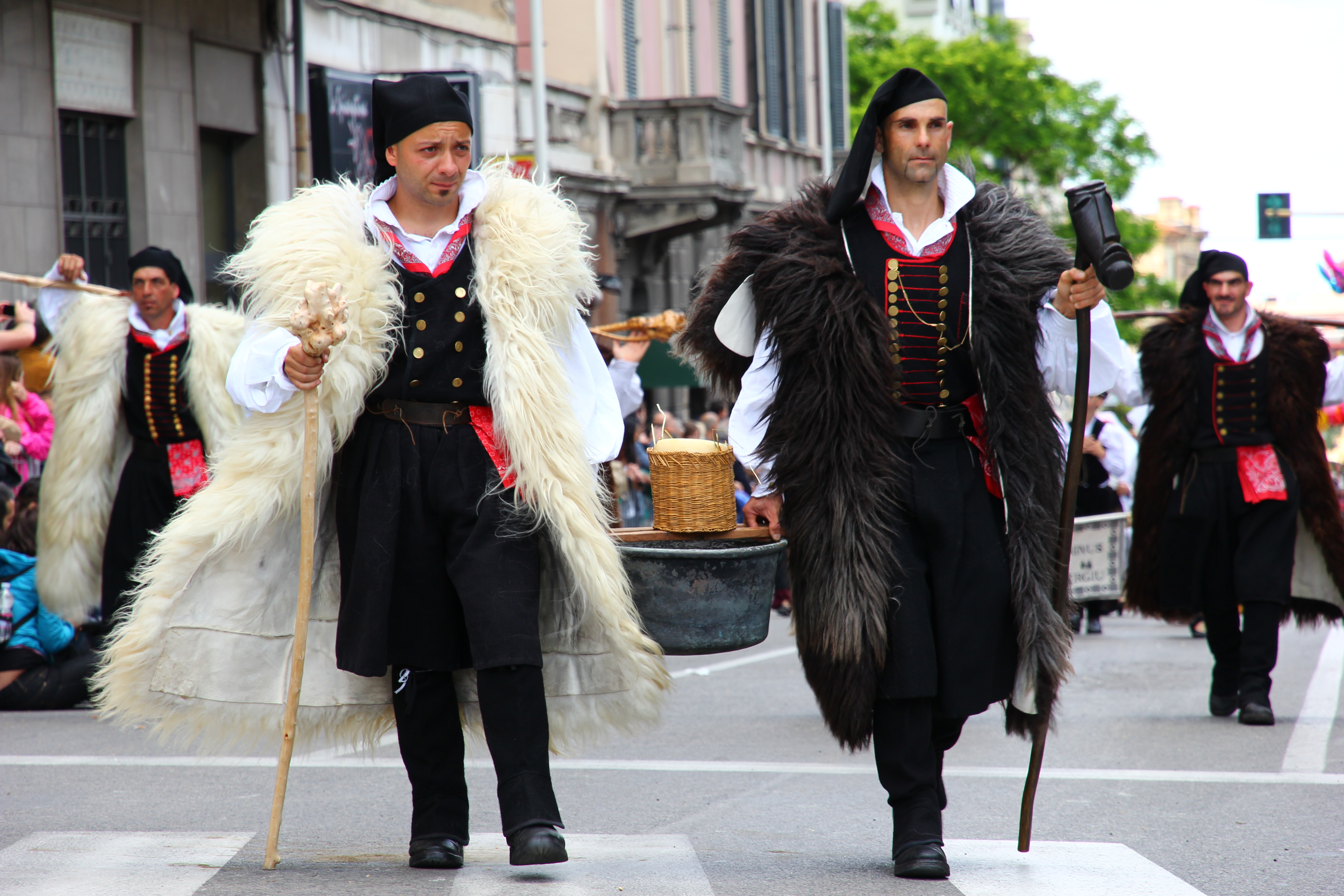 Cavalcata Sarda 2013 (Sassari)